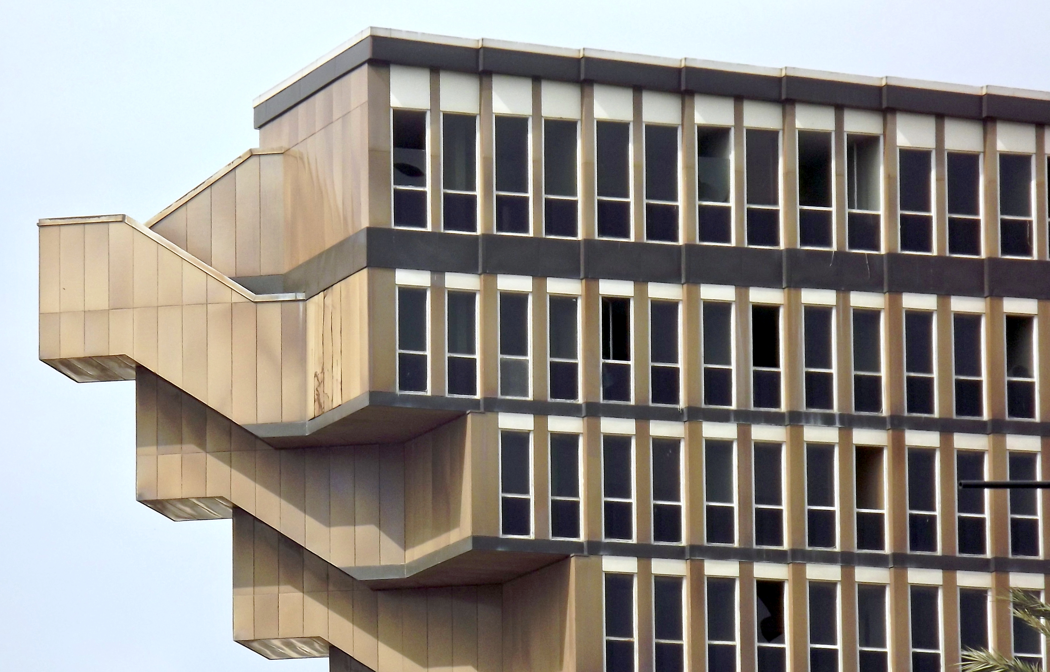 Ancien hotel du lac